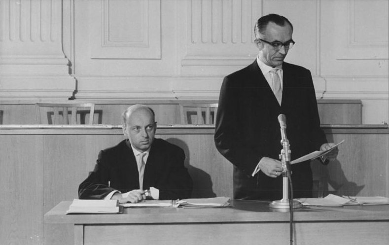 Oberstes Gericht, Globke-Prozess, Rinck Zentralbild Brüggmann Stöhr-8.7.1963 Globke-Prozess eröffnet. Vor dem 1. Strafsenat des Obersten Gerichts der DDR begann am 8. Juli 1963 der von der internationalen Öffentlichkeit mit großer Spannung erwartete Prozess gegen den langjährigen leitenden Mitarbeiter des faschistischen Reichsinnenministeriums und derzeitigen Bonner Staatssekretär Dr. Hans Globke. UBz: Rechtsanwalt Dr. Rinck gibt eine gemeinsame Erklärung der beiden Verteidiger ab.